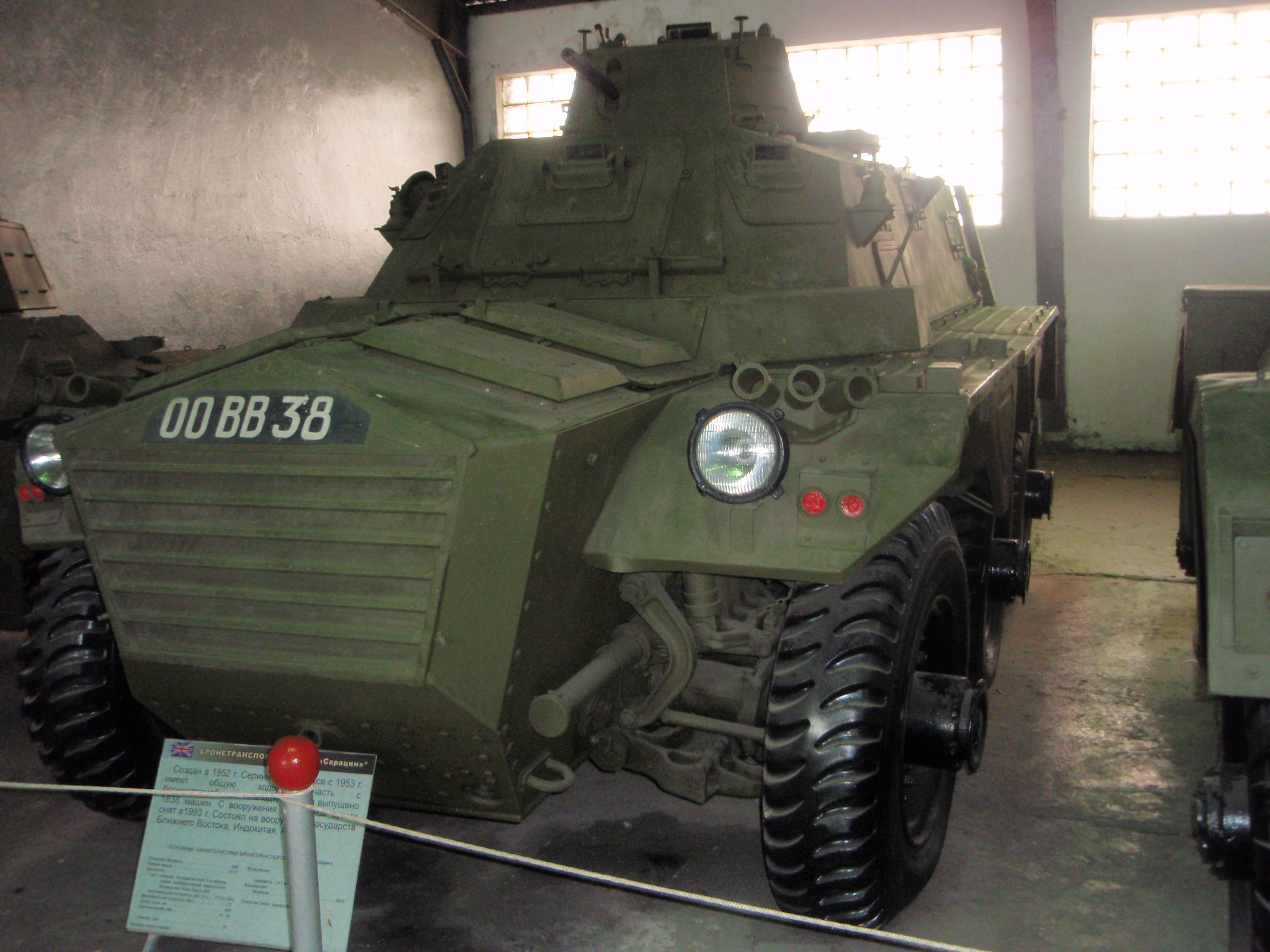 Британский бронетранспортёр FV602 (Сарацин) в Кубинке